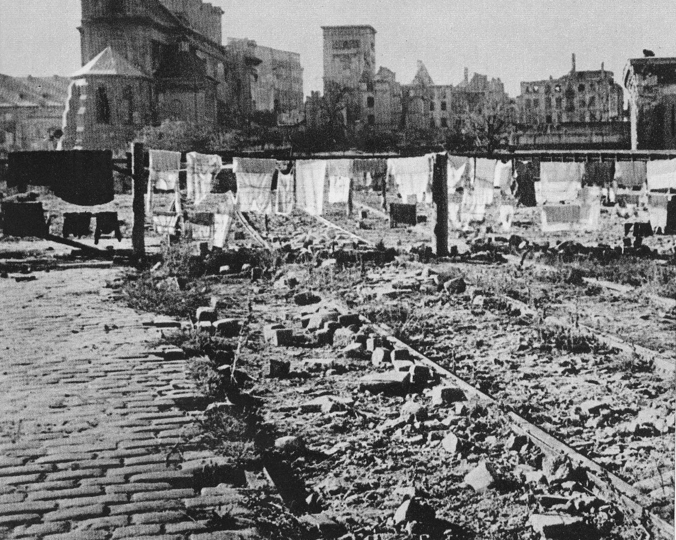 Wiadukt Pancera w Warszawie